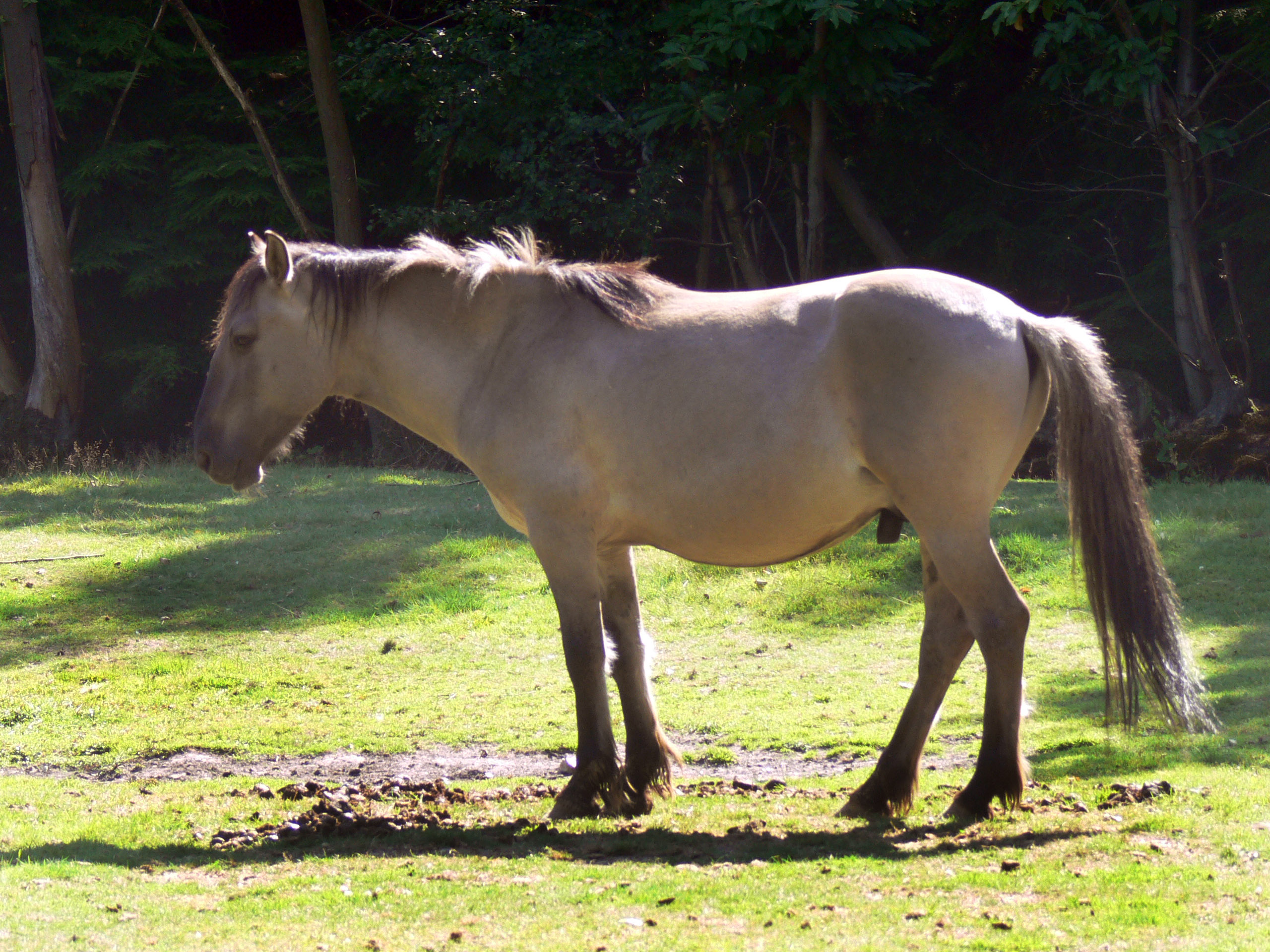 cheval présentant certaines caractéristiques de certains chevaux anciens ou préhistorique (type Tarpan) Parc de découverte de Wildwood